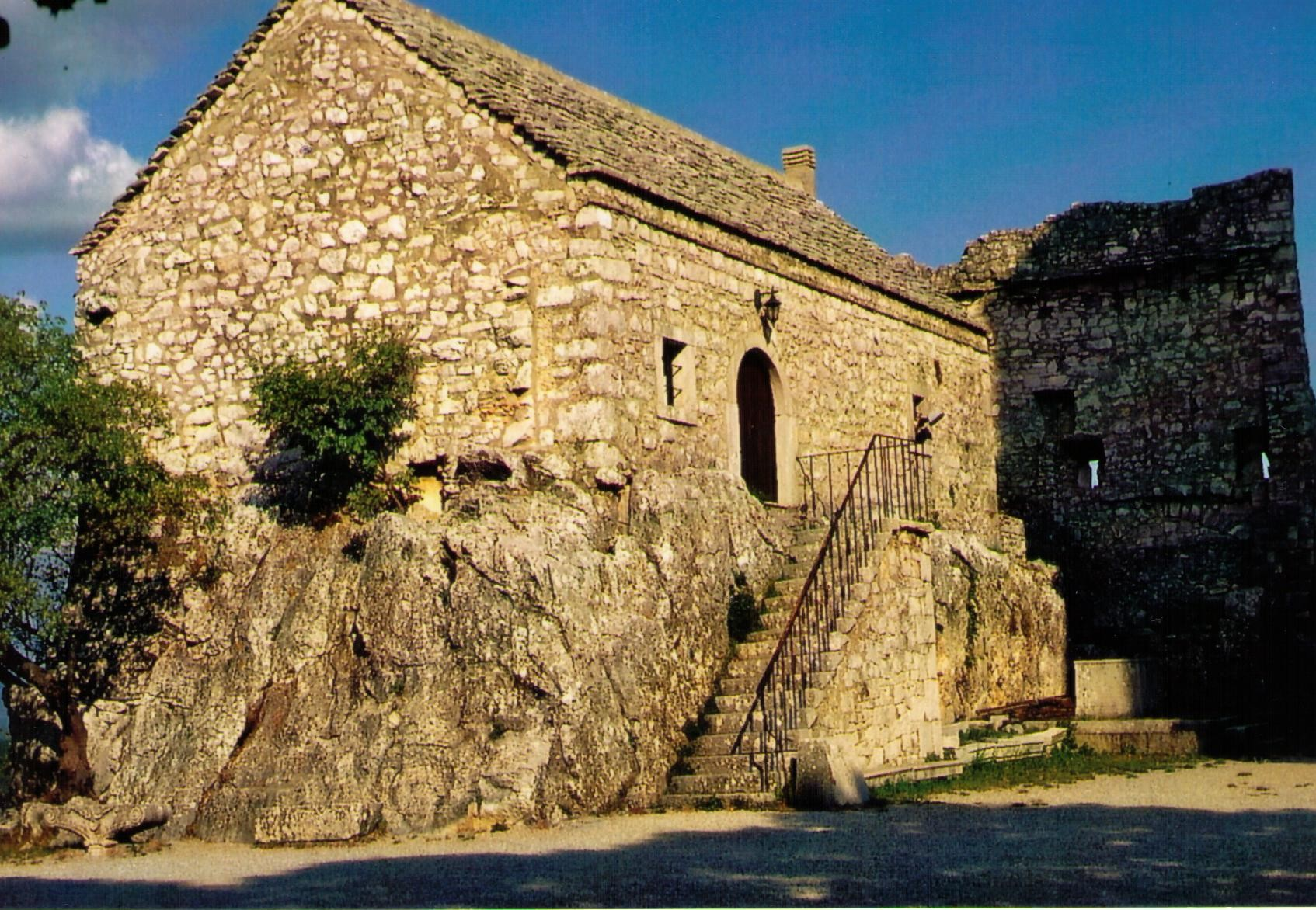 Repentabor